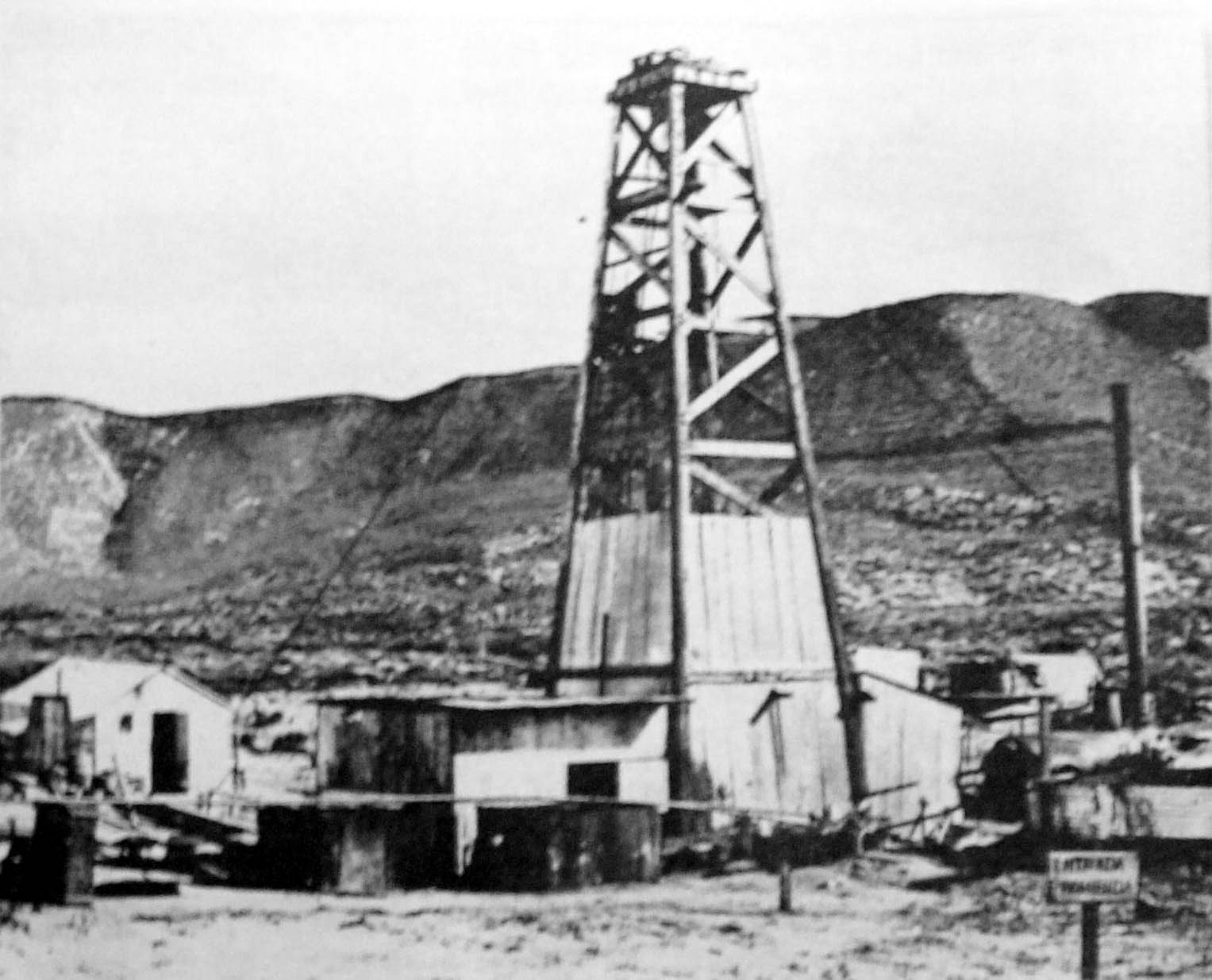 Es una foto del pozo de agua en Comodoro Rivadavia, en donde se descubrió petróleo el 13 de diciembre de 1907.